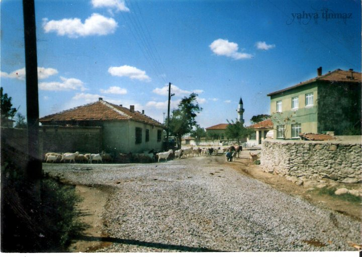 Hacıfaklı Köy meydanından görünüm